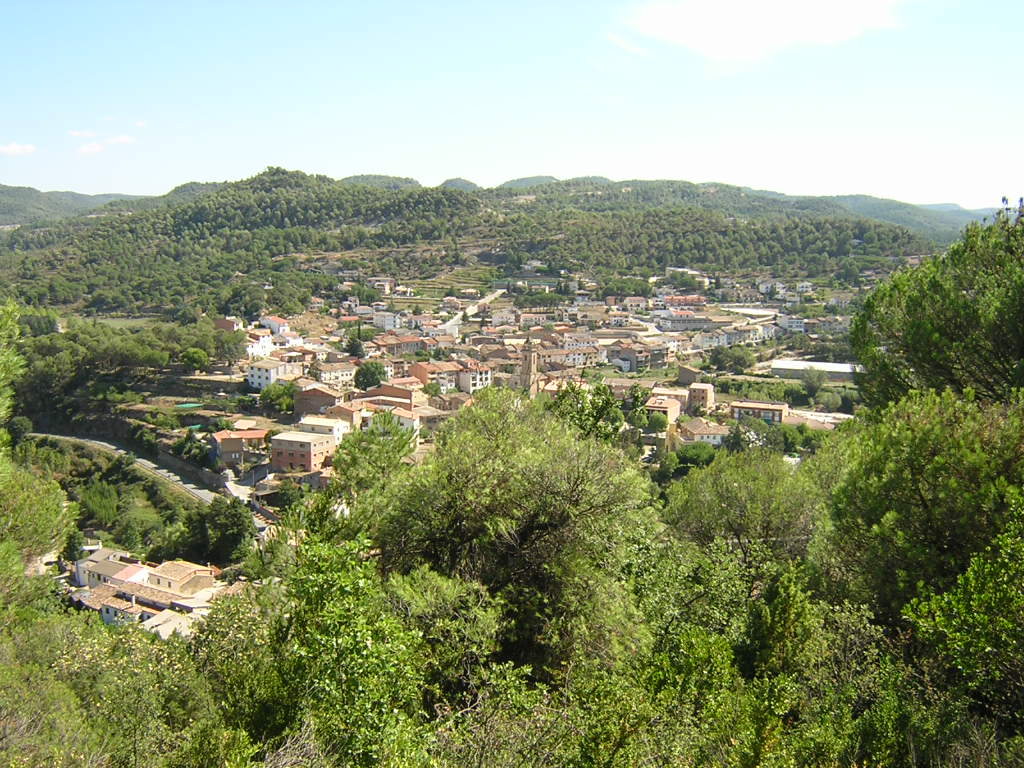 Monistrol de Calders (Moianès)